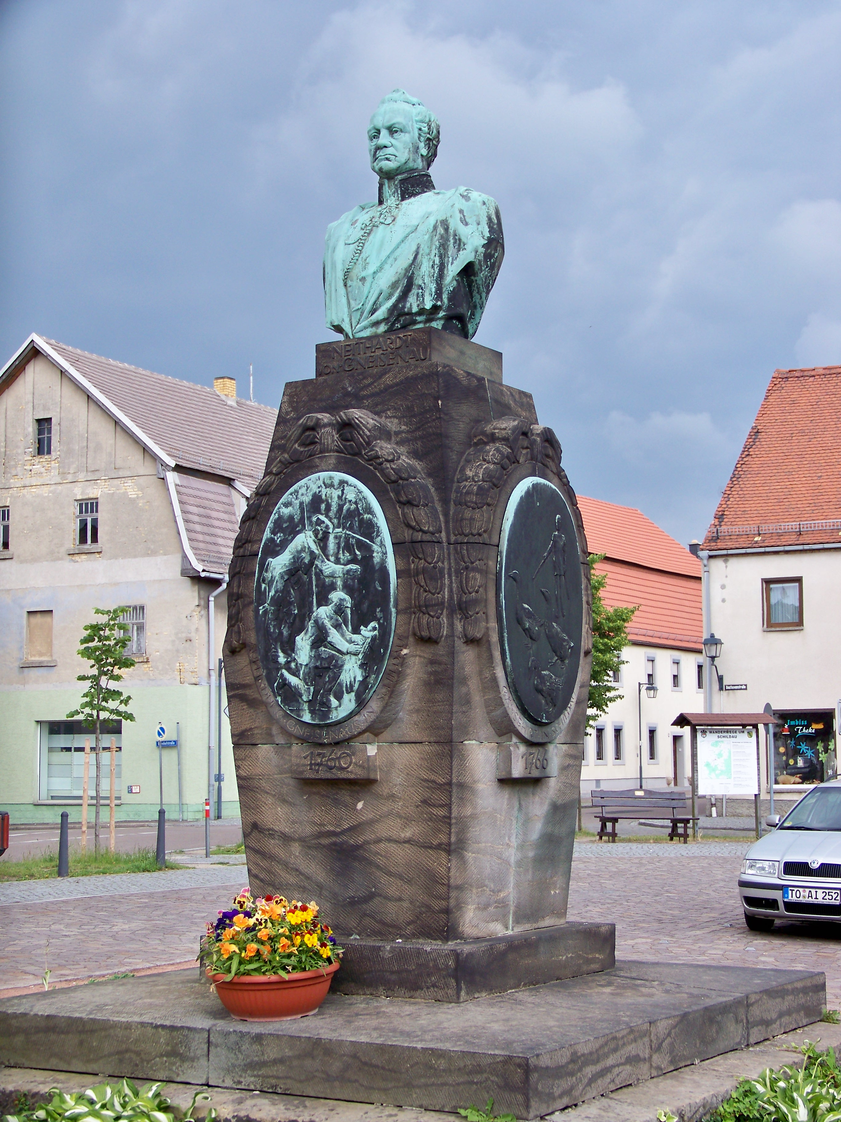 Geneisenaudenkmal in Schildau/Sachsen